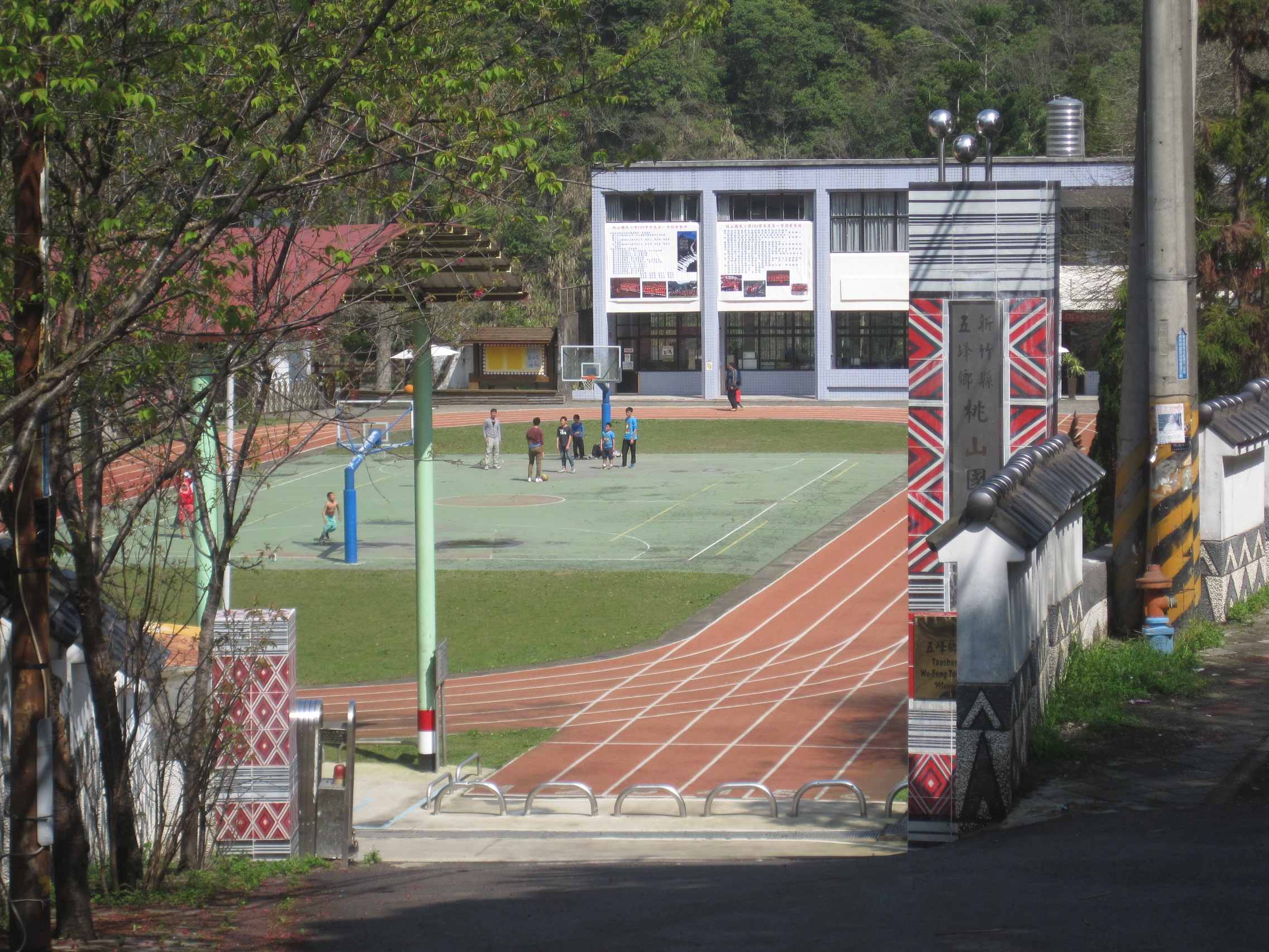 新竹縣五峰鄉桃山國小